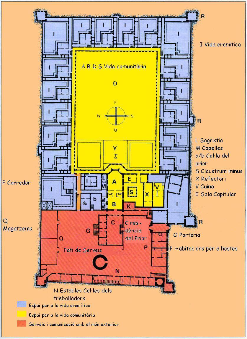 Plànol de la Cartoixa de Clermont de Viollet-le-Duc (text en català)